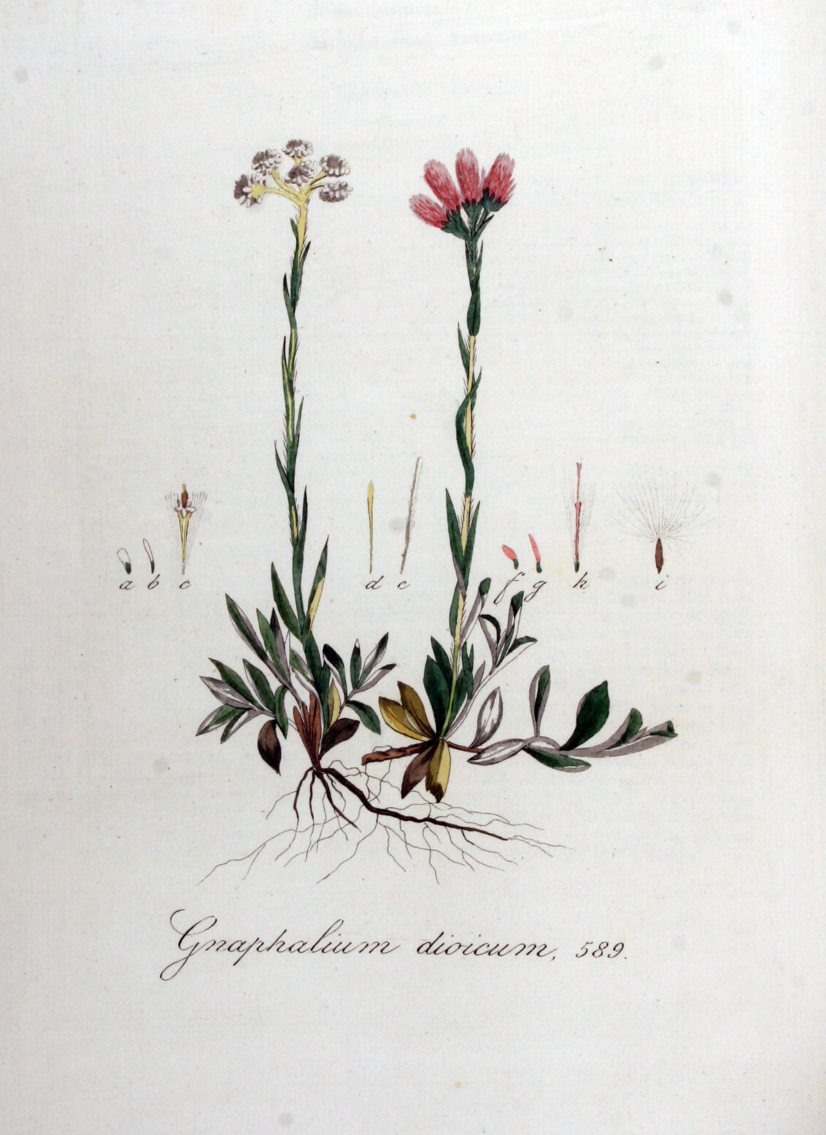 Antennaria dioica (L.) Gaertn. (Syn. Gnaphalium dioicum L.)